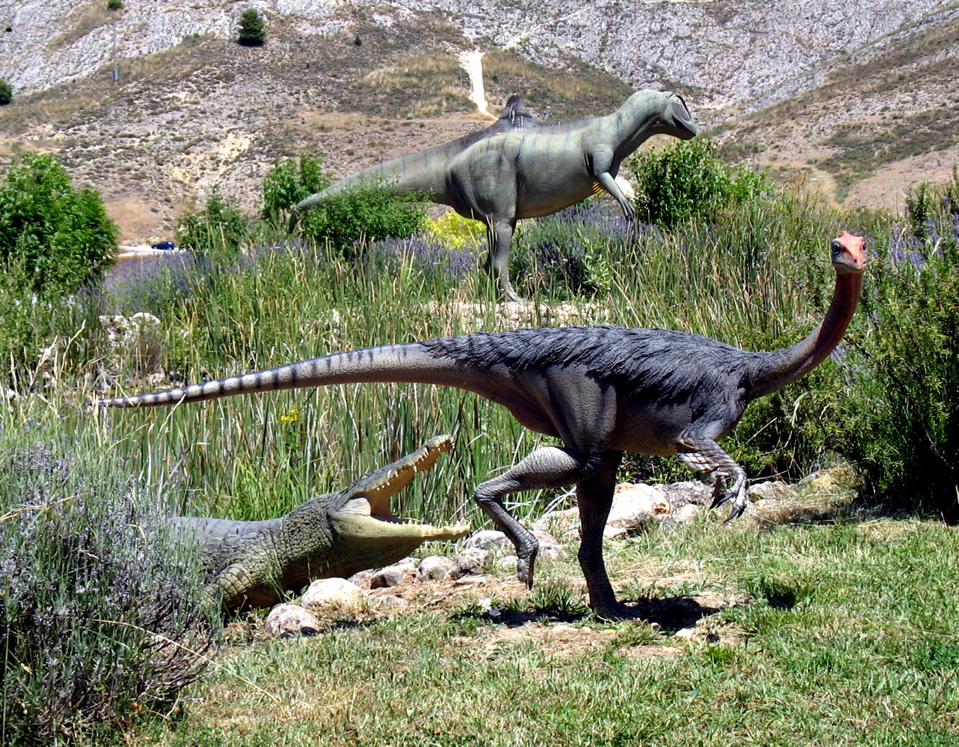 Figuras de Goniopholis (izda.), Pelecanimimus (centro) y Concavenator (al fondo) de Las Hoyas. Museo Paleontológico de Castilla-La Mancha (Cuenca)